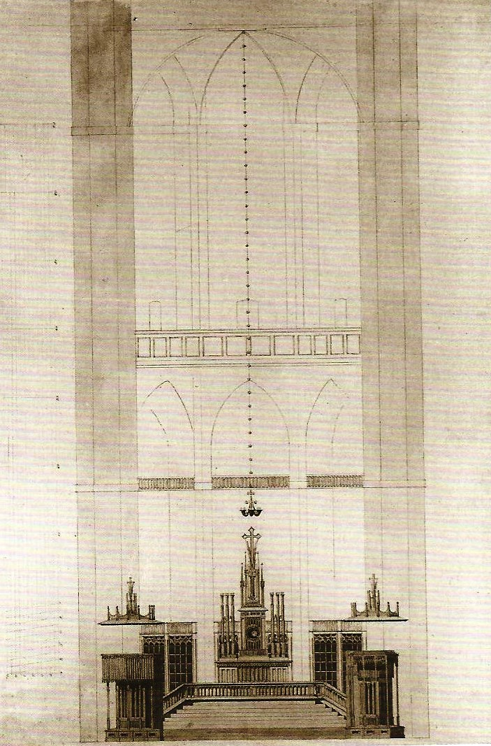 Marienkirche Stralsund, Ansicht der geplanten Chorausstattung, um 1817/18, Feder aquarelliert, 60,2 x 39,1 cm